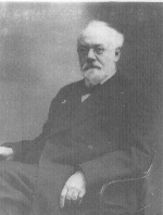 Николай Фёдорович Голубов (1856—1943) — терапевт, директор терапевтической клиники Московского университета.